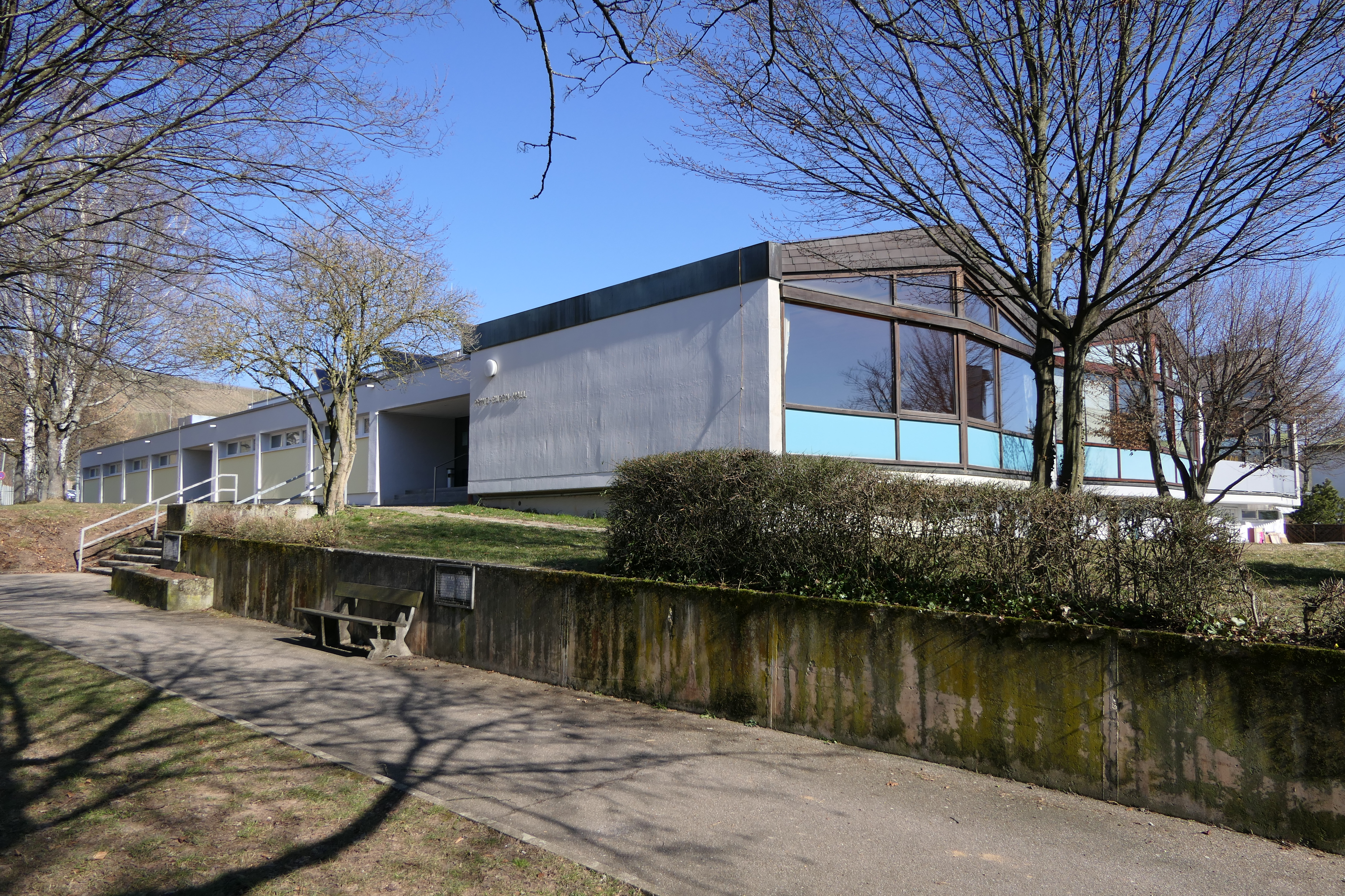 Die Prinz-Eugen-Halle am Fuße der Weinberge in Weinstadt-Grossheppach, Rems-Murr-Kreis.